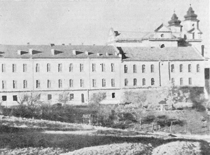 Więzienie zakład Rzemieślniczy w Wiśniczu